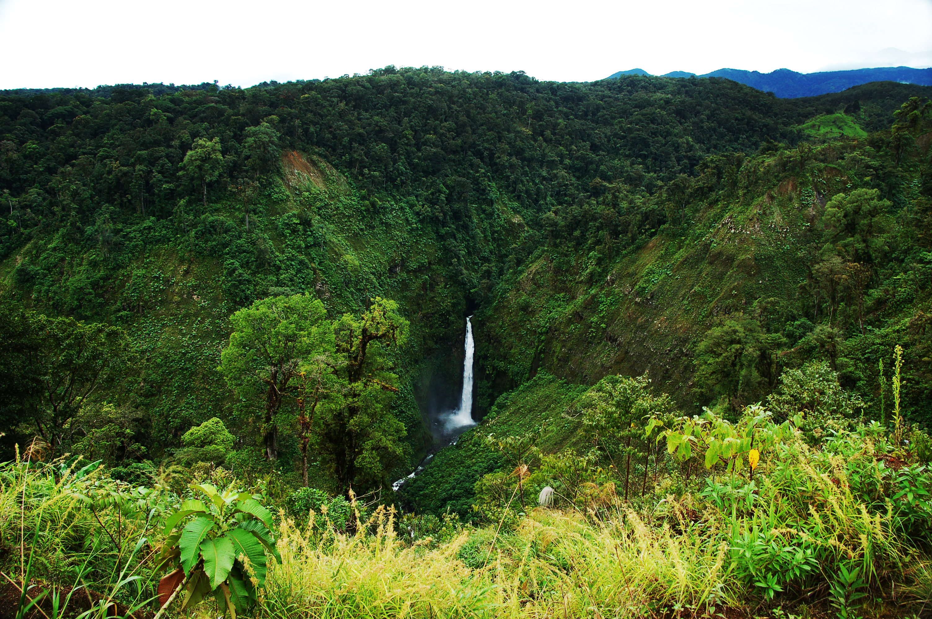 Catarata del río Sarapiquí. Costa Rica.